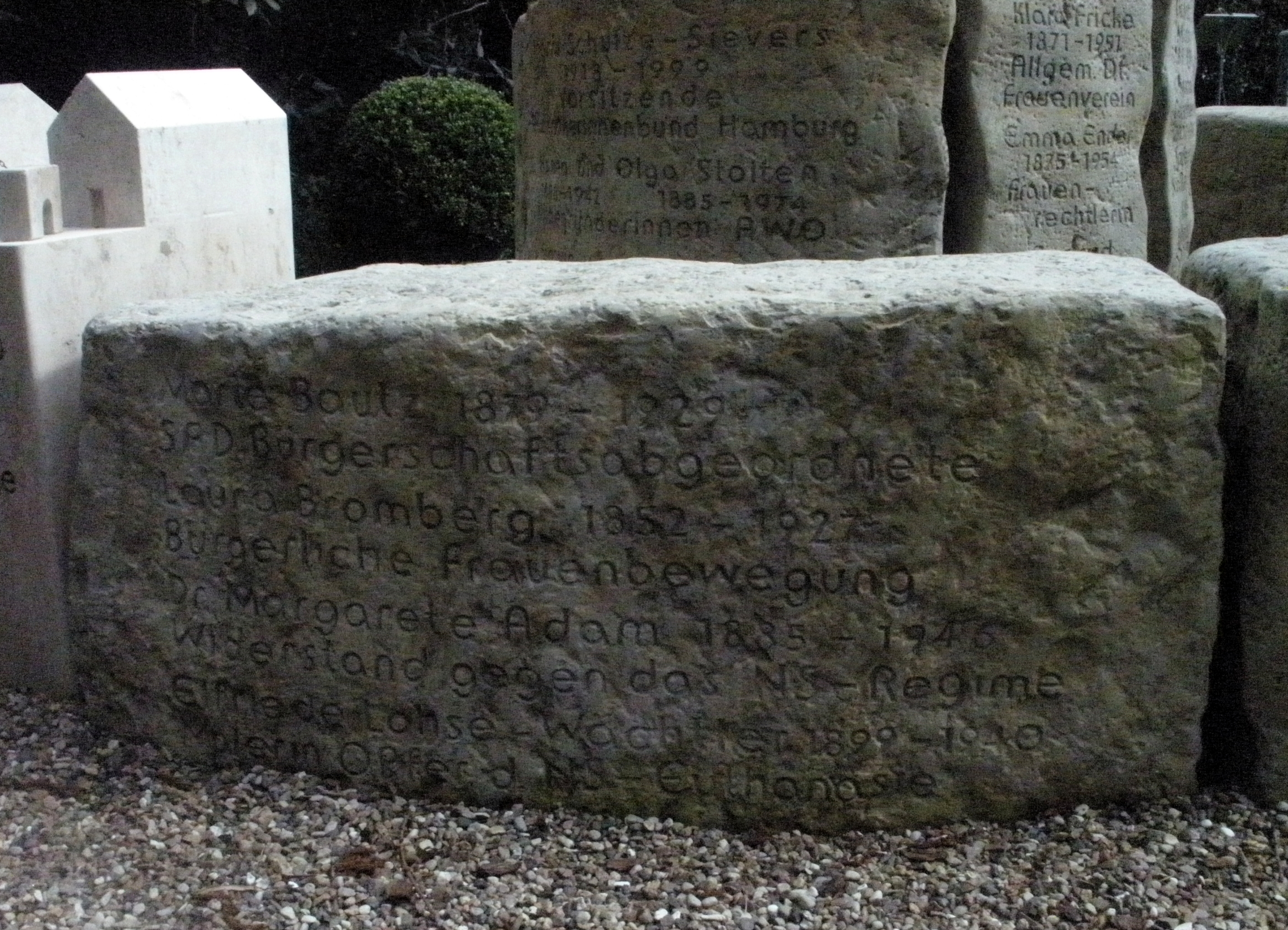 garten der frauen friedhof ohlsdorf